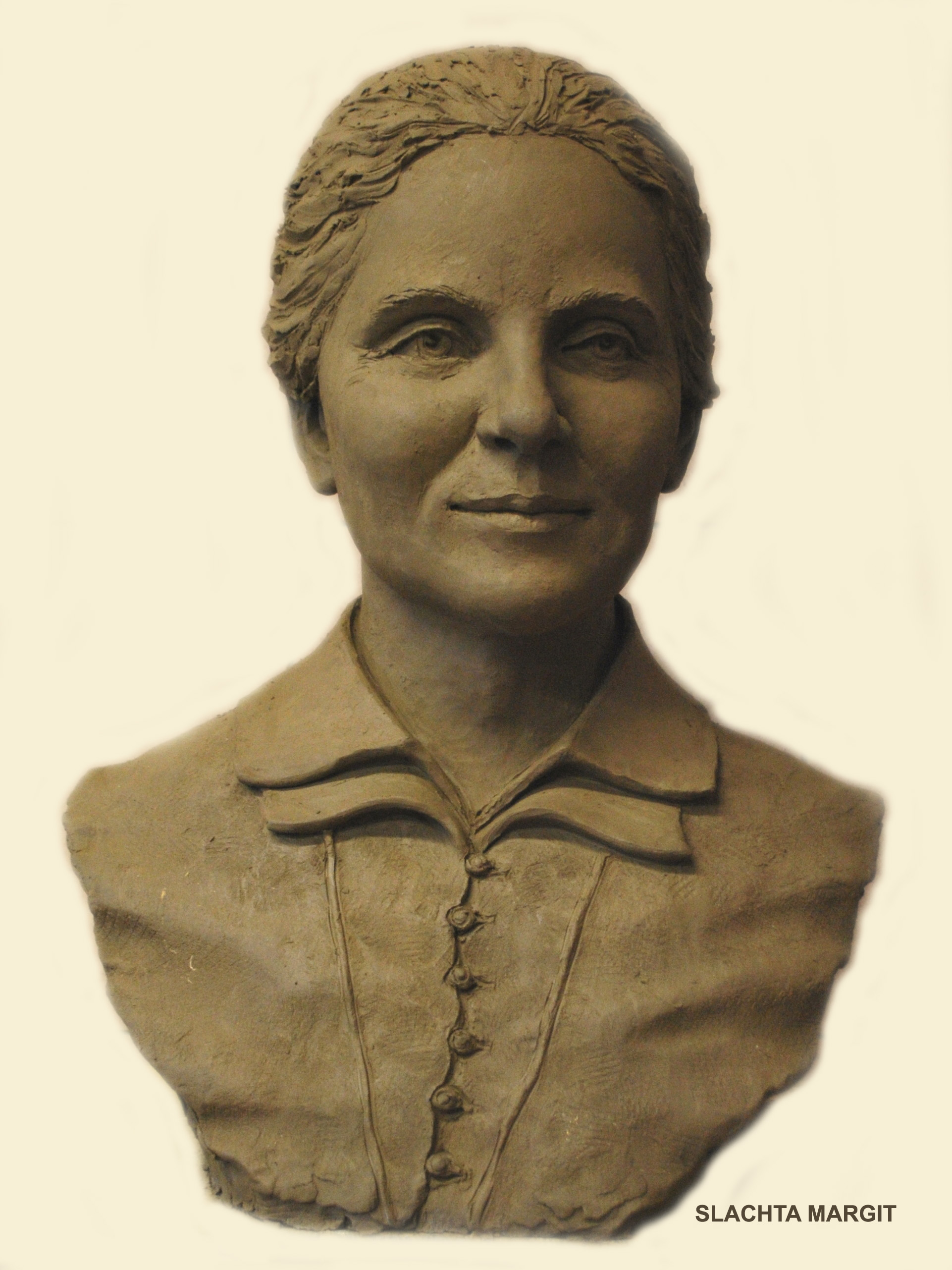 Juha Richárd: Slachta Margit-portré (terrakotta)